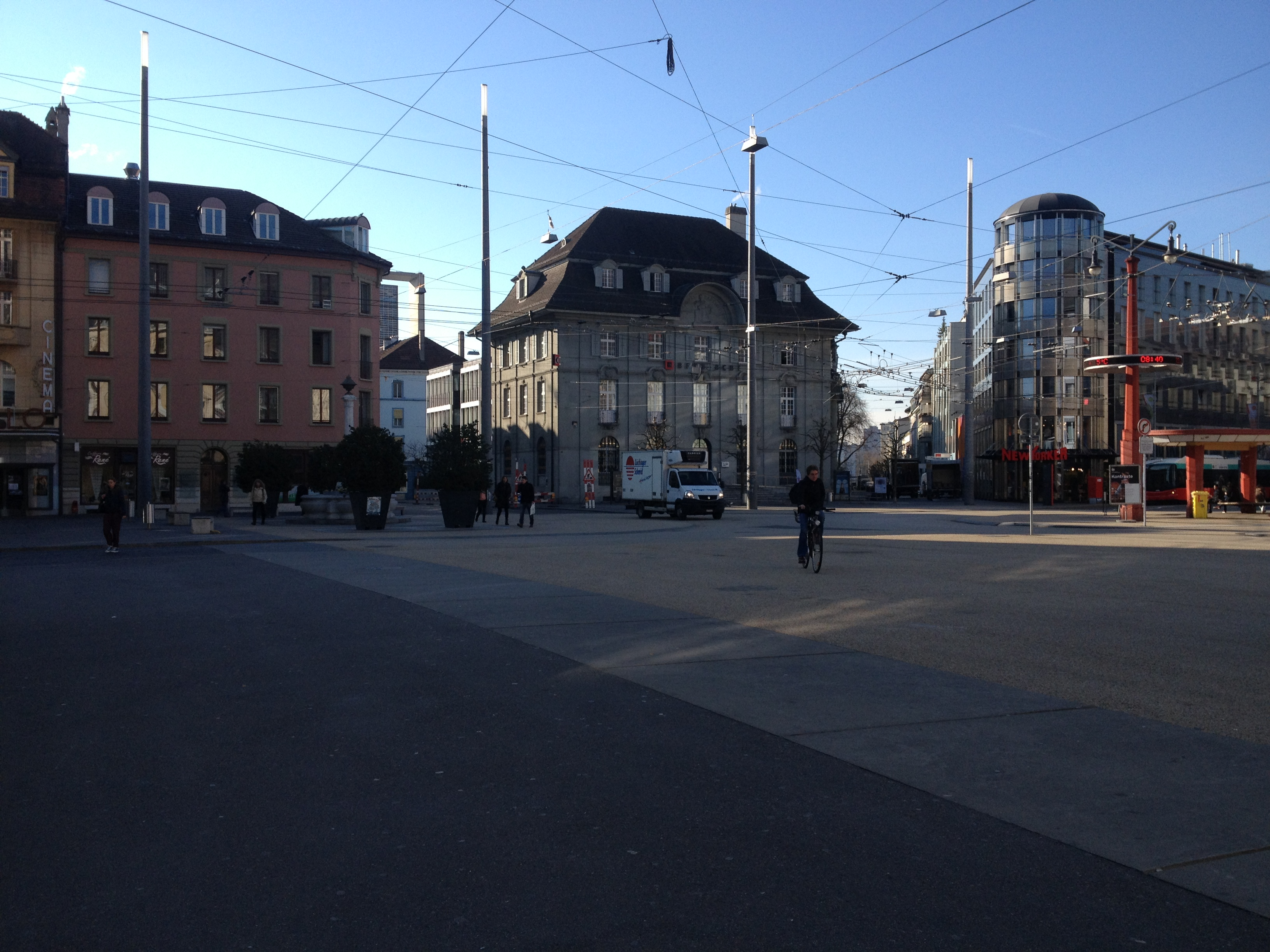 Zentralplatz Biel